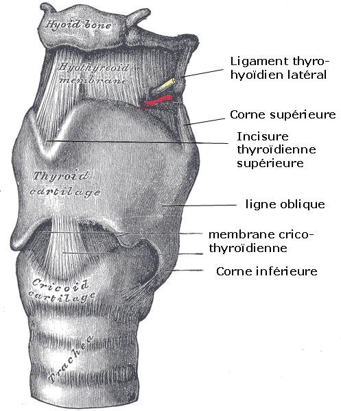 Human Larynx